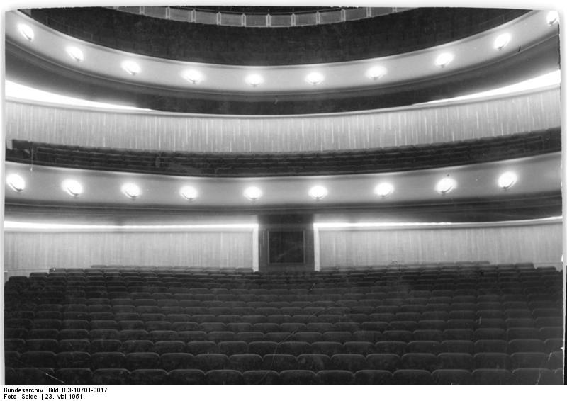 Chemnitz, Opernhaus, Zuschauerraum Illus Seidel Hein-B. 23.5.1951 Das Karl-Marx-Städter Opernhaus wird am 26. Mai 1951 eingeweiht. UBz: Blick in den Theaterraum.